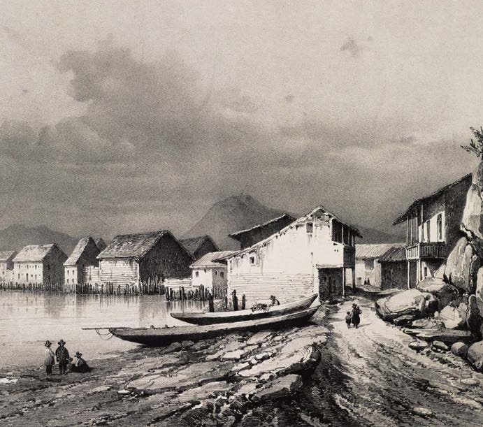 El puerto peruano de Paita, a mediados del siglo XIX.